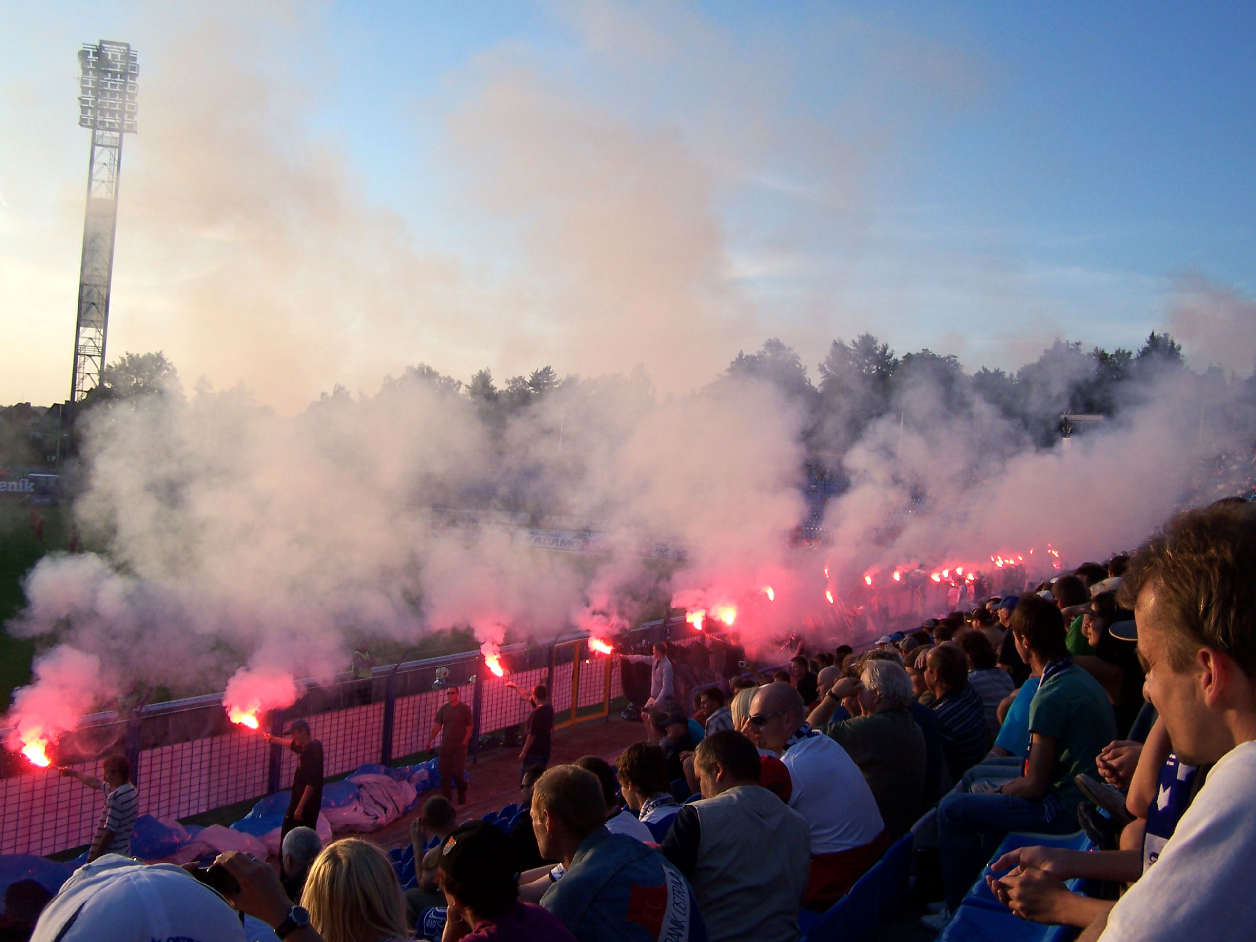 Bazaly Stadium during FC Baník Ostrava - 1. FC Brno match in Ostrava